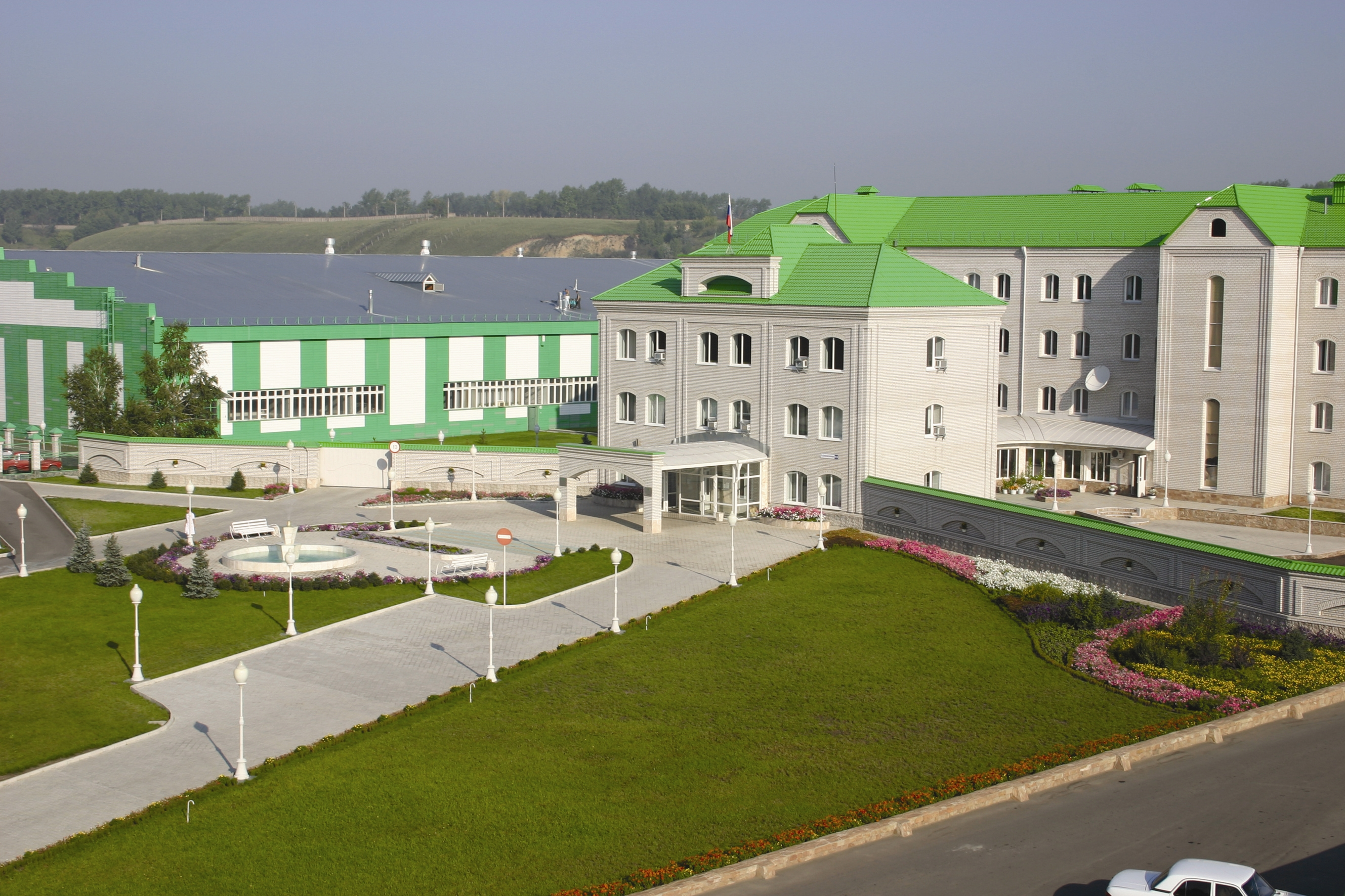 Производственные мощности компании "Эвалар", Бийск, Алтайский край, Россия